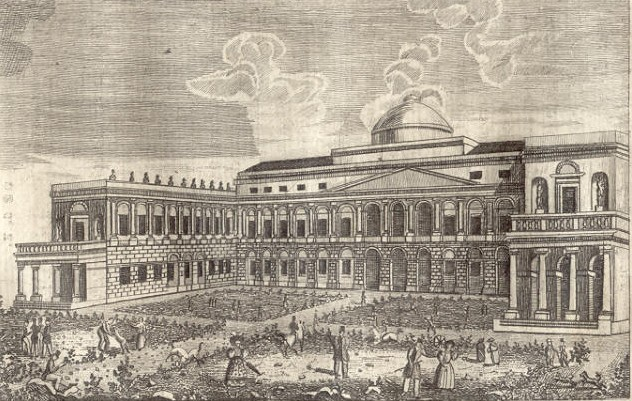 Villa San Donato à Florence, vers 1820.